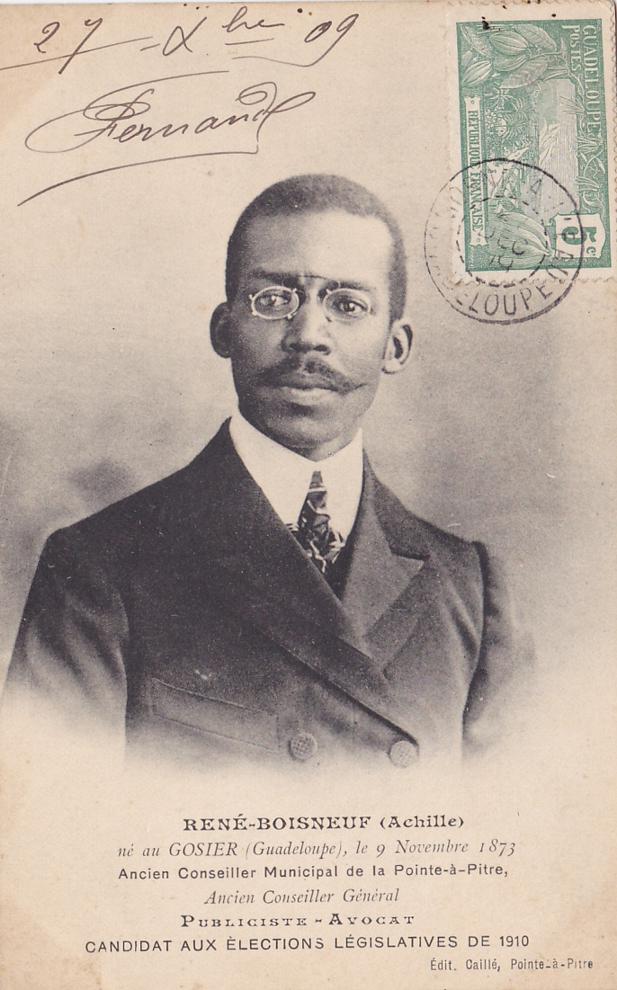 maire de pointe a pitre